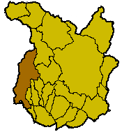 Localisation de la commune de Pescia à l'intérieur de la province de Pistoia.